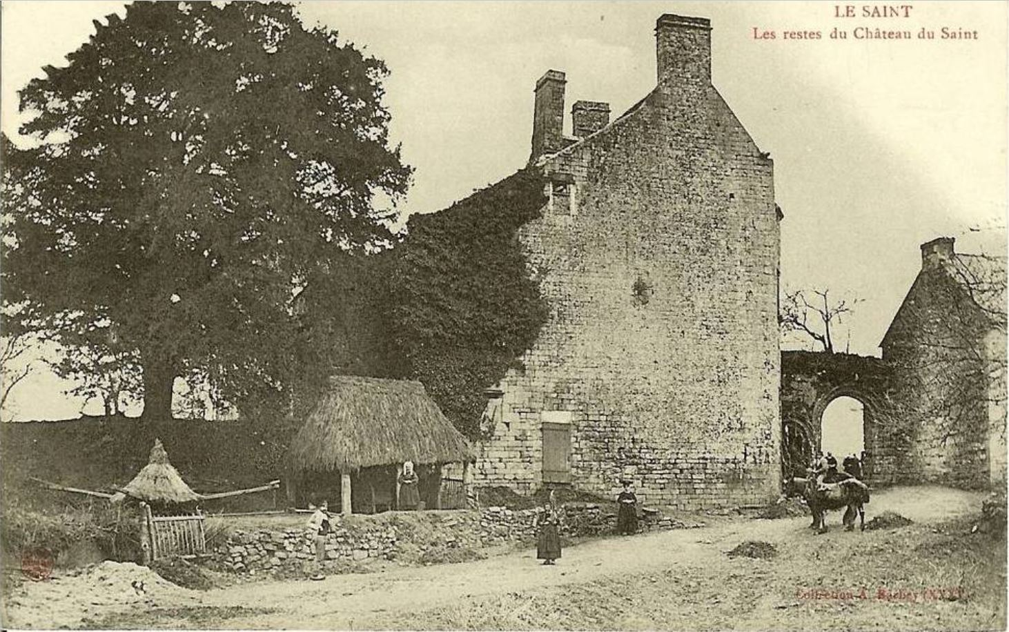 Les restes du château du Saint dans le département du Morbihan vers 1900 (carte postale ancienne).